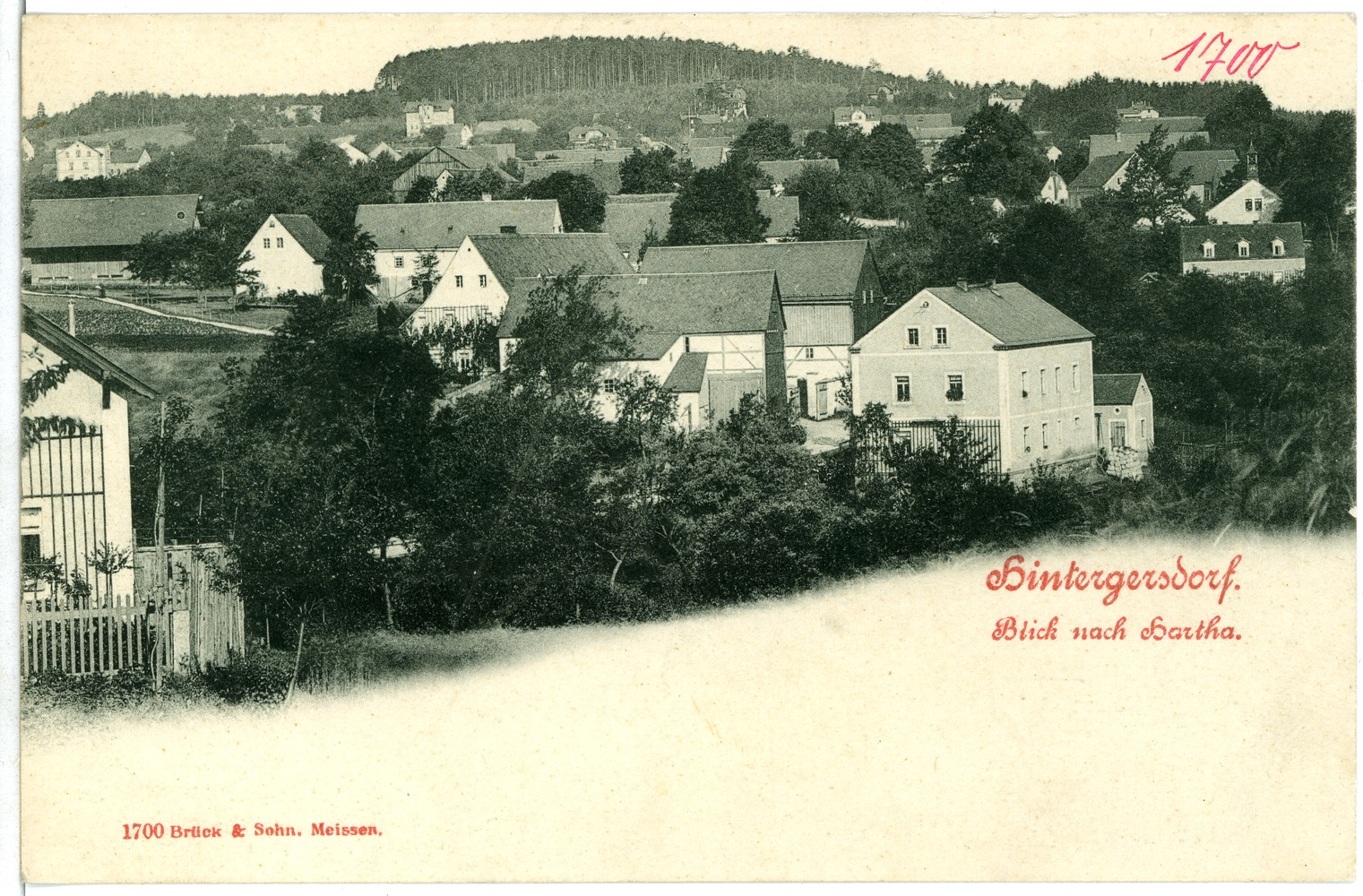 Hintergersdorf; Blick auf Hartha This postcard is from publisher Brück & Sohn in Meißen ( postcard has a unique number 01700 and is available in a higher resolution at the publisher. This images was uploaded in a cooperation project between Wikipedians and the publisher.